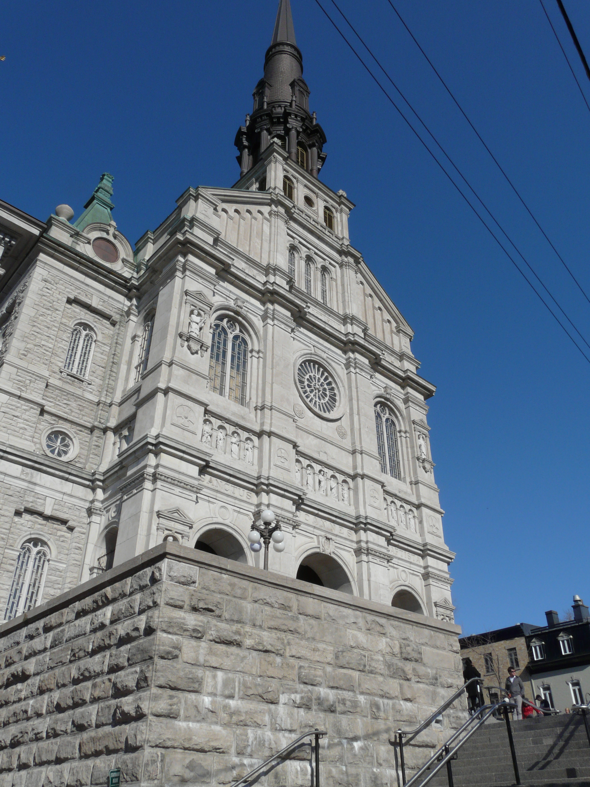 L'Église Saint-Jean-Baptiste, à Québec. Situé dans l'arrondissement La Cité-Limoilou.